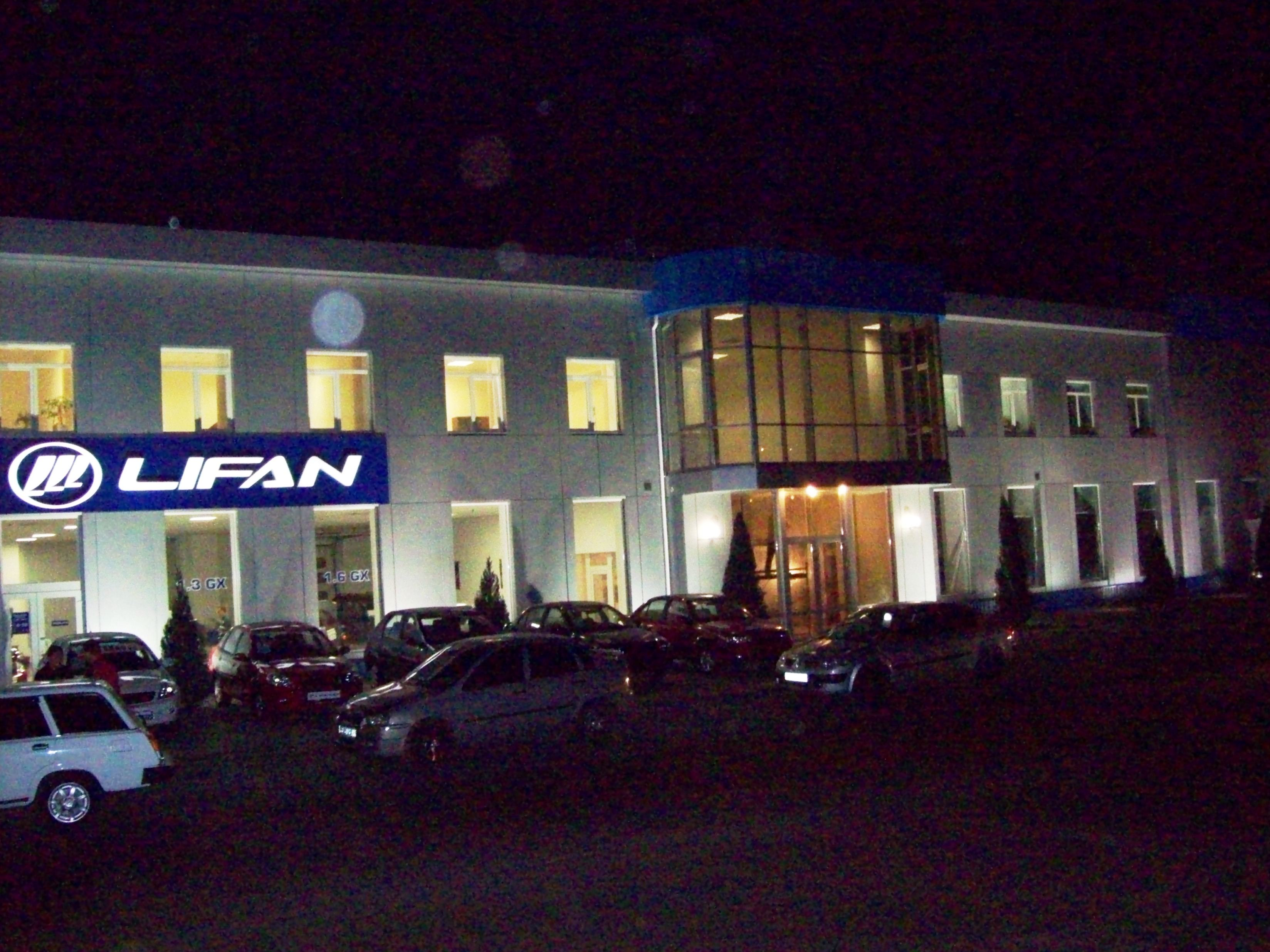 Знято фотоапаратом Kodak